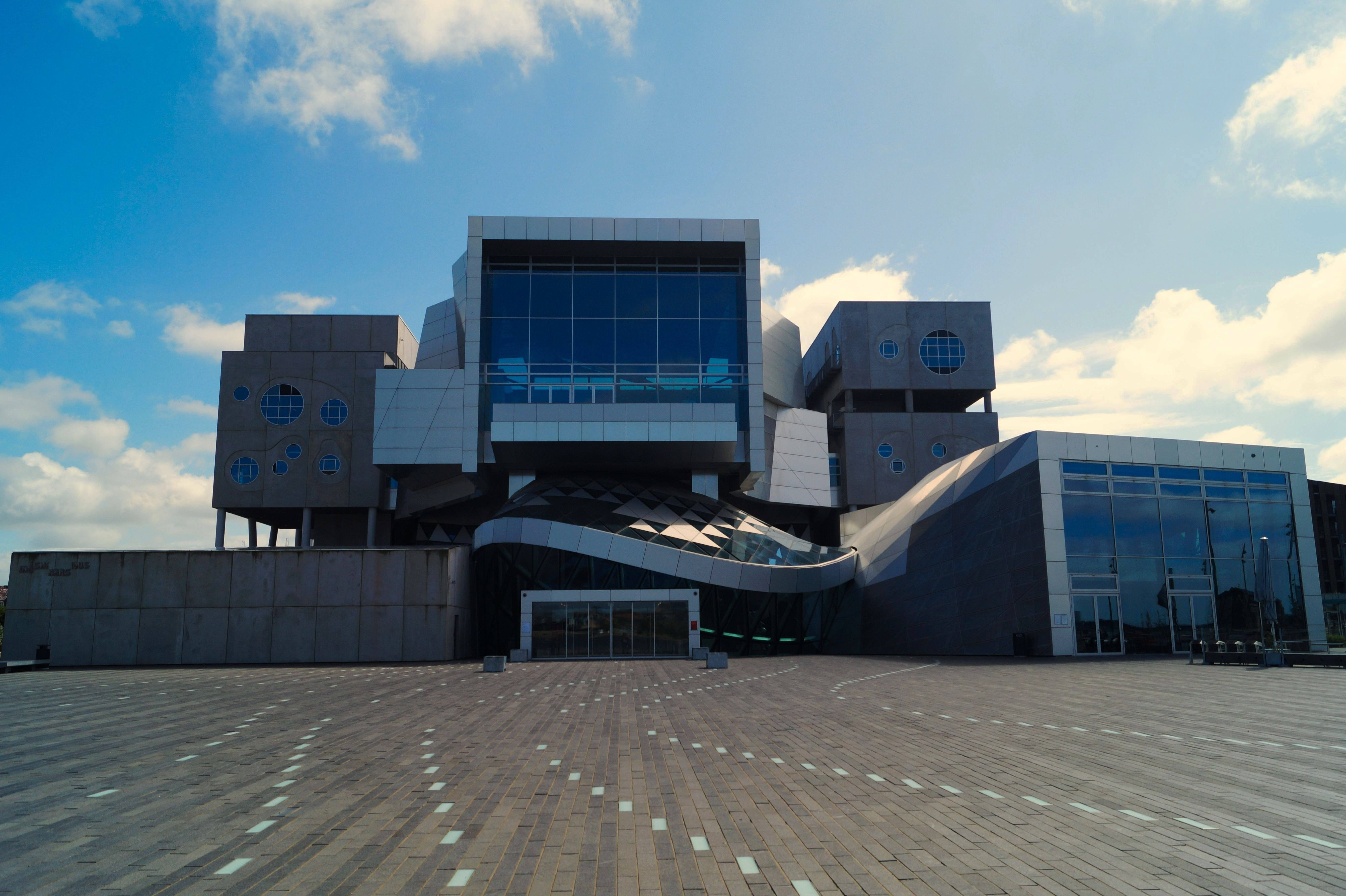 Haus der Musik in Aalborg